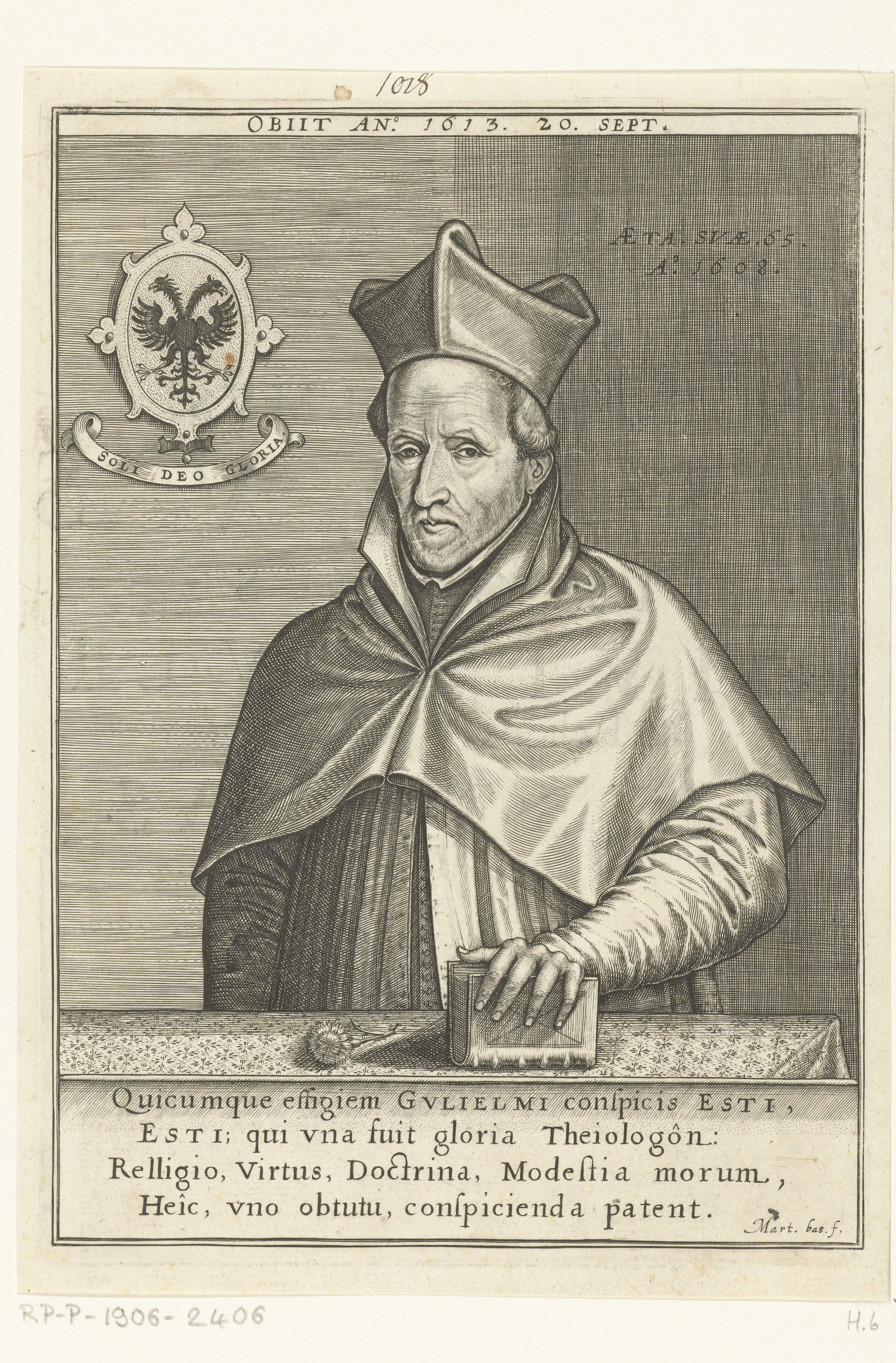 IdentificatieTitel(s): Portret van Willem Hessels van Est op 65-jarige leeftijdObjecttype: prent boekillustratie Objectnummer: RP-P-1906-2406Catalogusreferentie: Hollstein Dutch 6Opschriften / Merken: verzamelaarsmerk, verso midden, gestempeld: Lugt 2228Omschrijving: Bladzijde uit een boek met een portret van de jezuïet Willem Hessels van Est op 65-jarige leeftijd. Zijn hand rust op een boek, op tafel ligt een anjer. Met een onderschrift van vier regels in het Latijn. Aan de versokant een Franse titelpagina.VervaardigingVervaardiger: prentmaker: Martin Baes (vermeld op object)Datering: 1614 - 1616Fysieke kenmerken: gravureMateriaal: papier Techniek: graveren (drukprocedé)Afmetingen: plaatrand: h 215 mm × b 153 mmToelichtingWaar: schijnlijk illustratie voor: W. van Est, In omnes Divi Pauli apostoli epistolas commentariorum, Douai, B. Bellerus, 1614-1616.Verwerving en rechtenVerwerving: aankoop 1906Copyright: Publiek domein